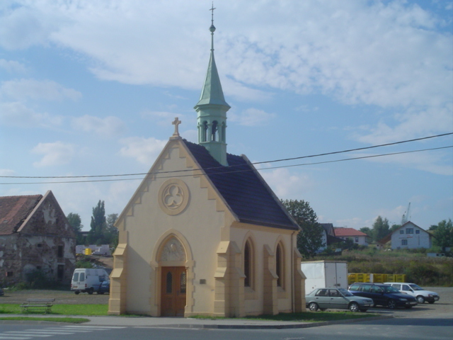 Tlučná - kaplička